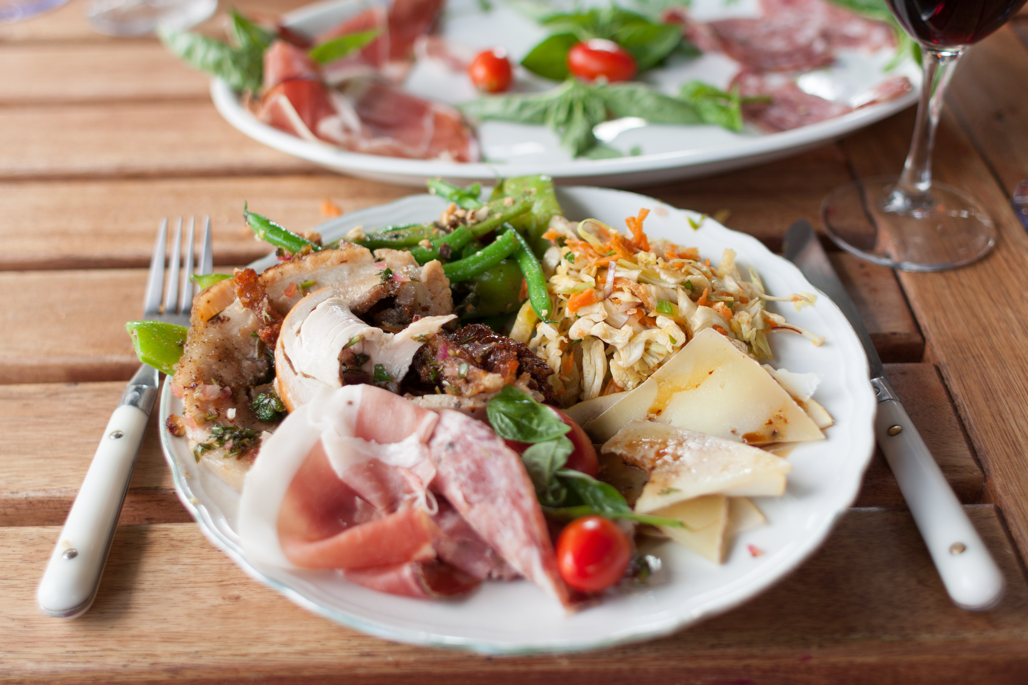 A late lunch